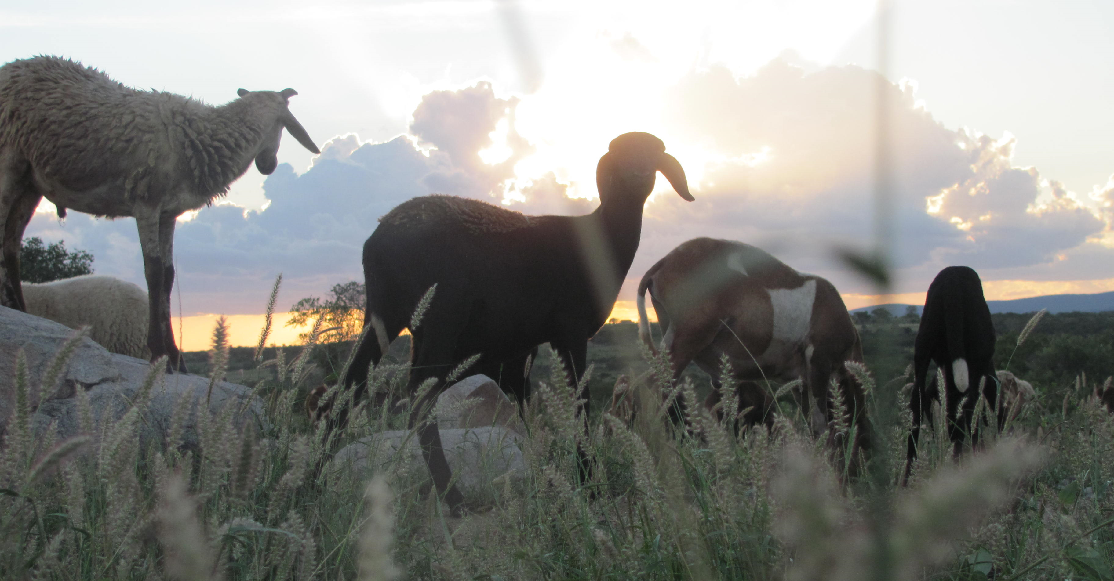 Ovinos pastando ao por-do-sol num sítio em Araci-BA.